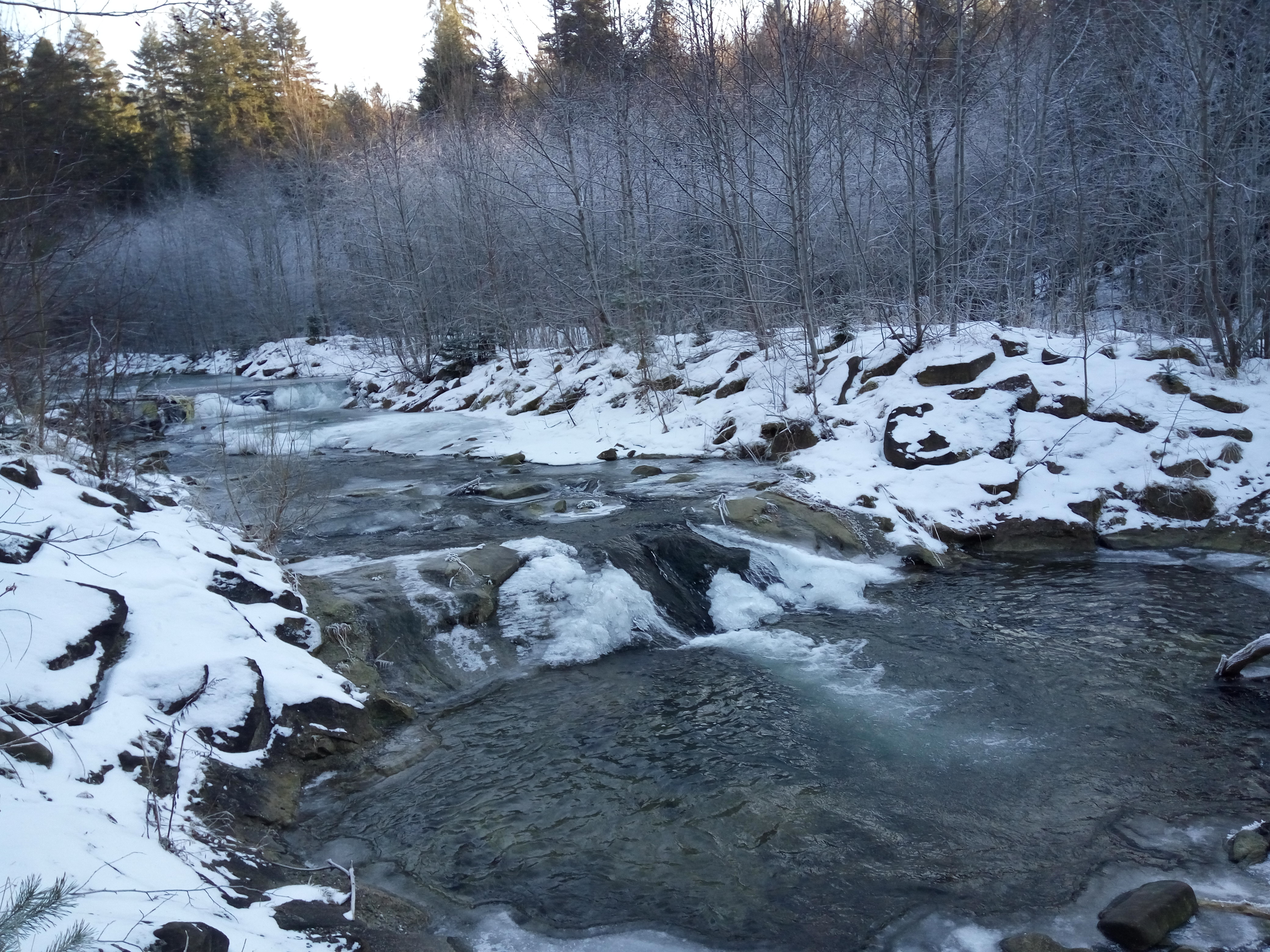 Milowski Potok w zimie